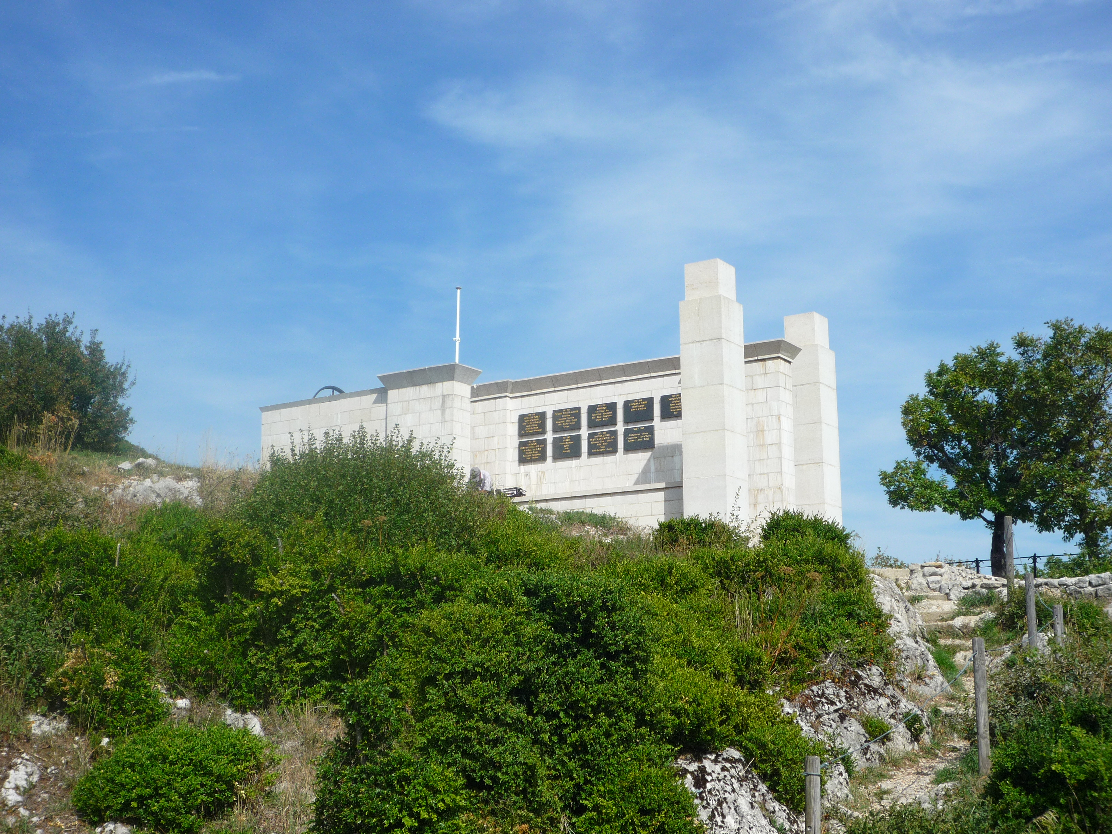 Mémorial des troupes de montagne au Mont Jalla (635m), 160m au dessus de la Bastille de Grenoble.